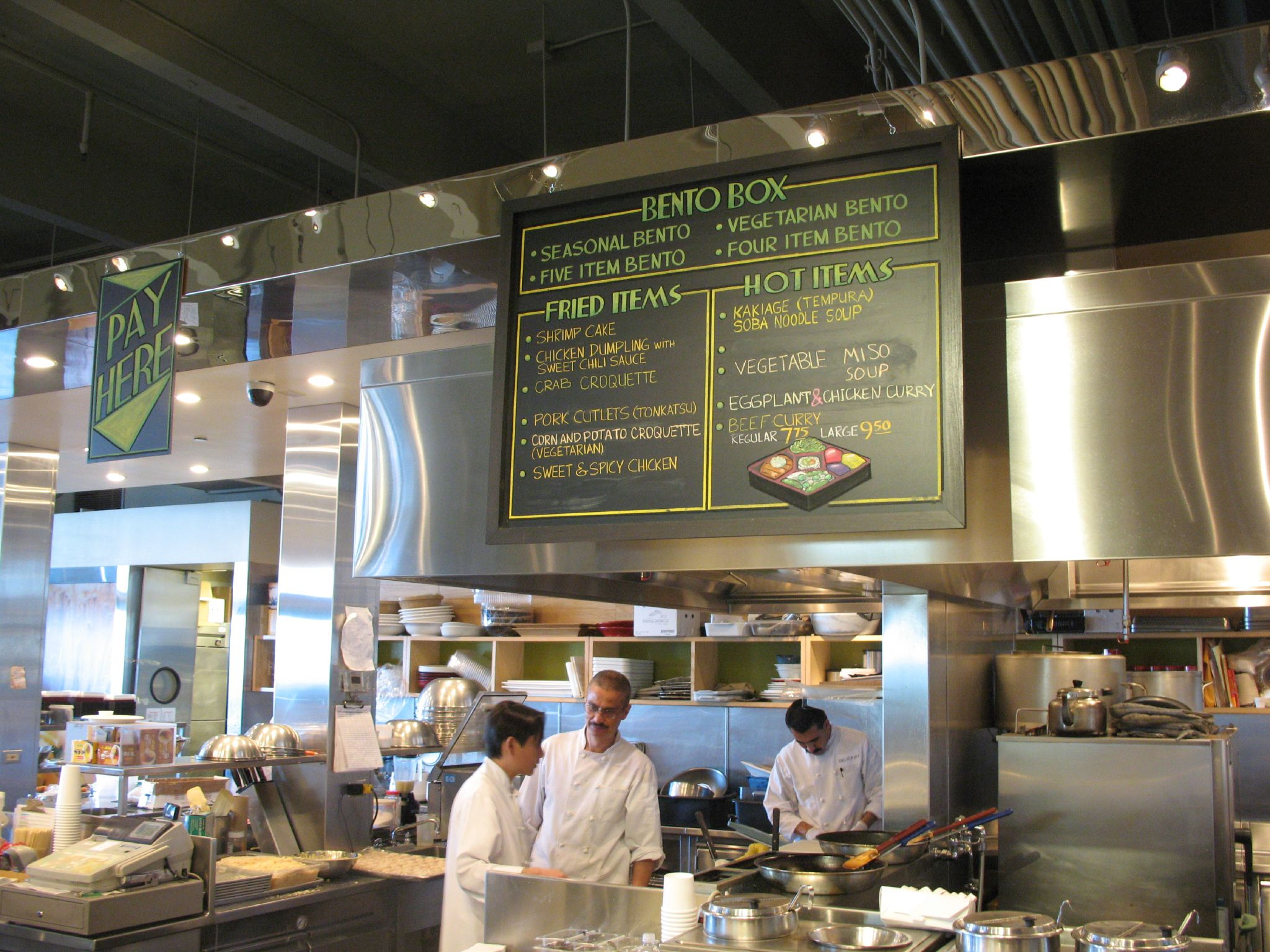 Delica rf-1